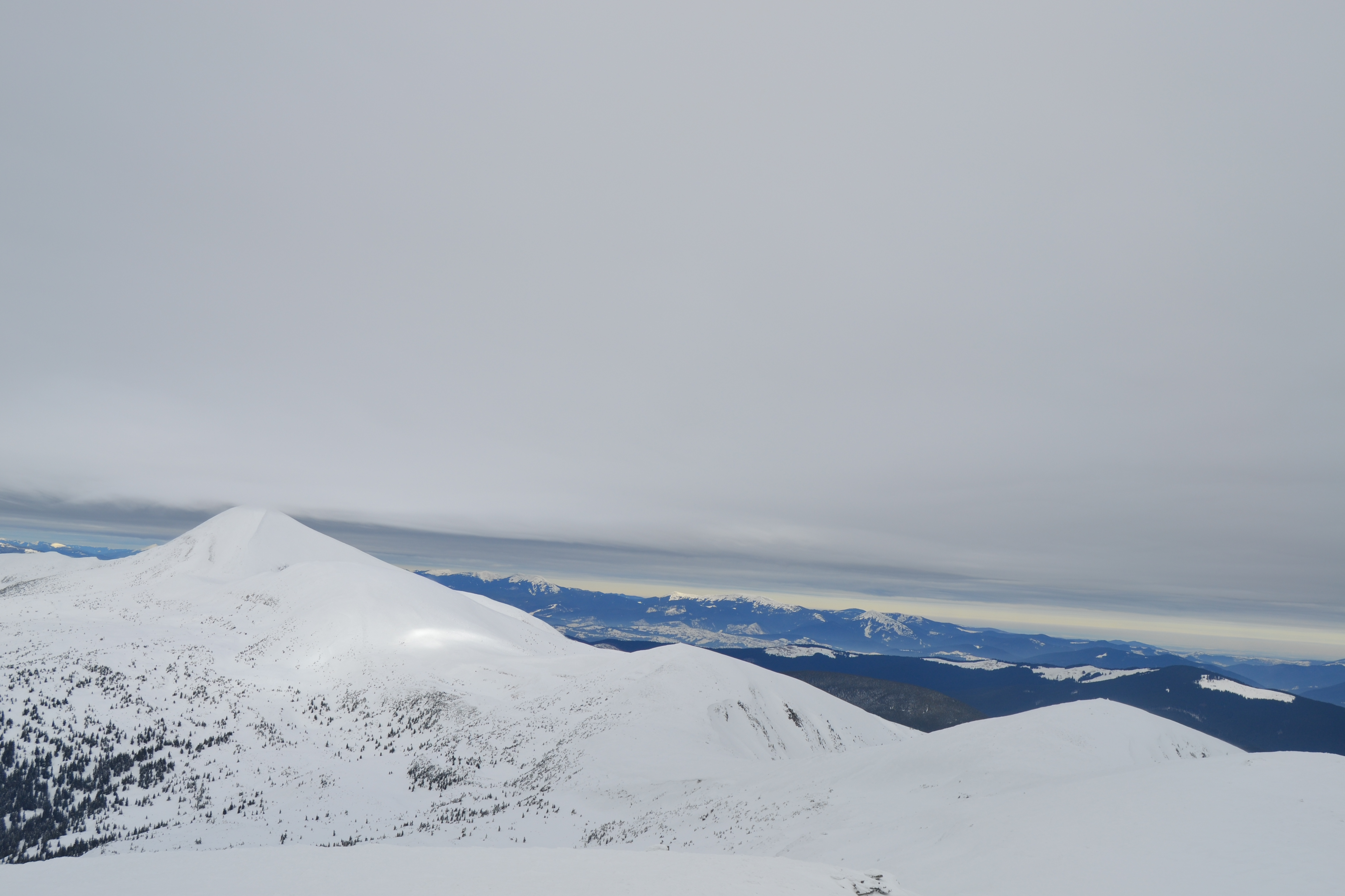 Вид на г. Говерлу (ліворуч), г. Пожижевська (в центрі) і г. Данцер (праворуч) з г. Туркул